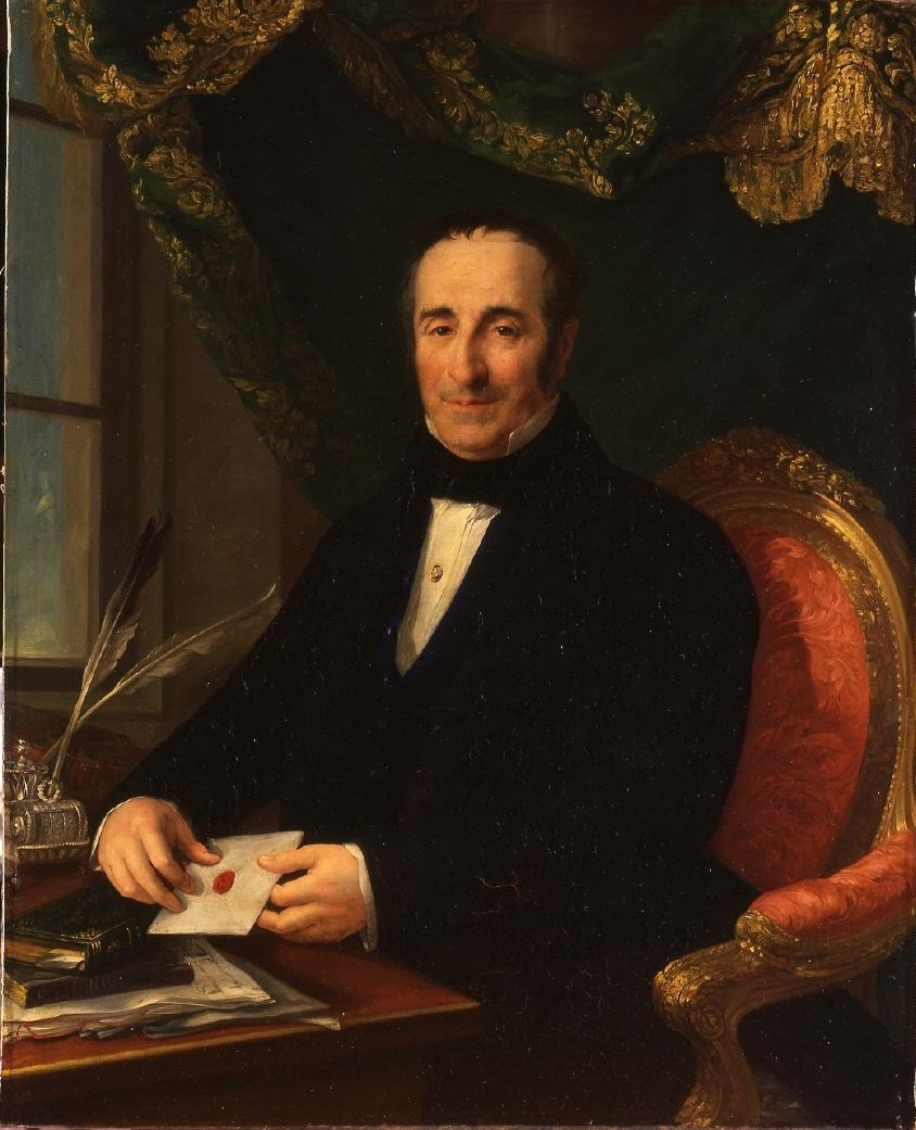 Retrato del aristócrata y coleccionista español José de Aguilera y Contreras (1787-1872), XVI marqués de Cerralbo.